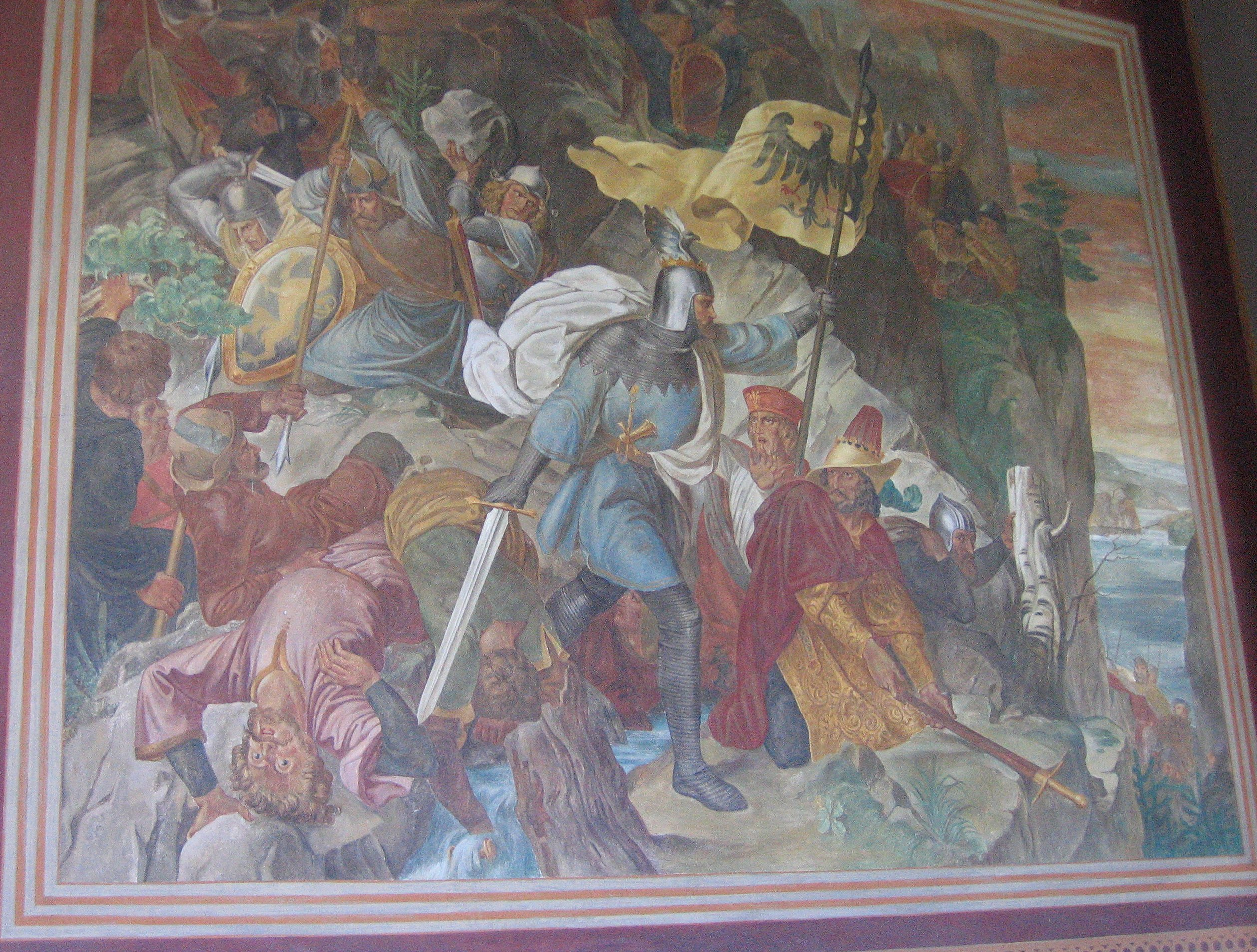 Wandgemälde im Münchener Hofgarten mit Szenen aus der bayerischen Geschichte. „Befreiung des deutschen Heeres im Engpasse von Chiusa durch Otto den Großen von Wittelsbach (1155)“ von Ernst Förster.